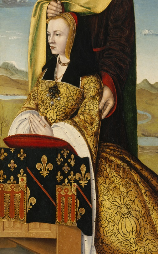 Détail du tableau Triptyque de Vic-le-Comte / The Annunciation with Saints and Donors, also called/aussi nommé The Latour d’Auvergne Triptych